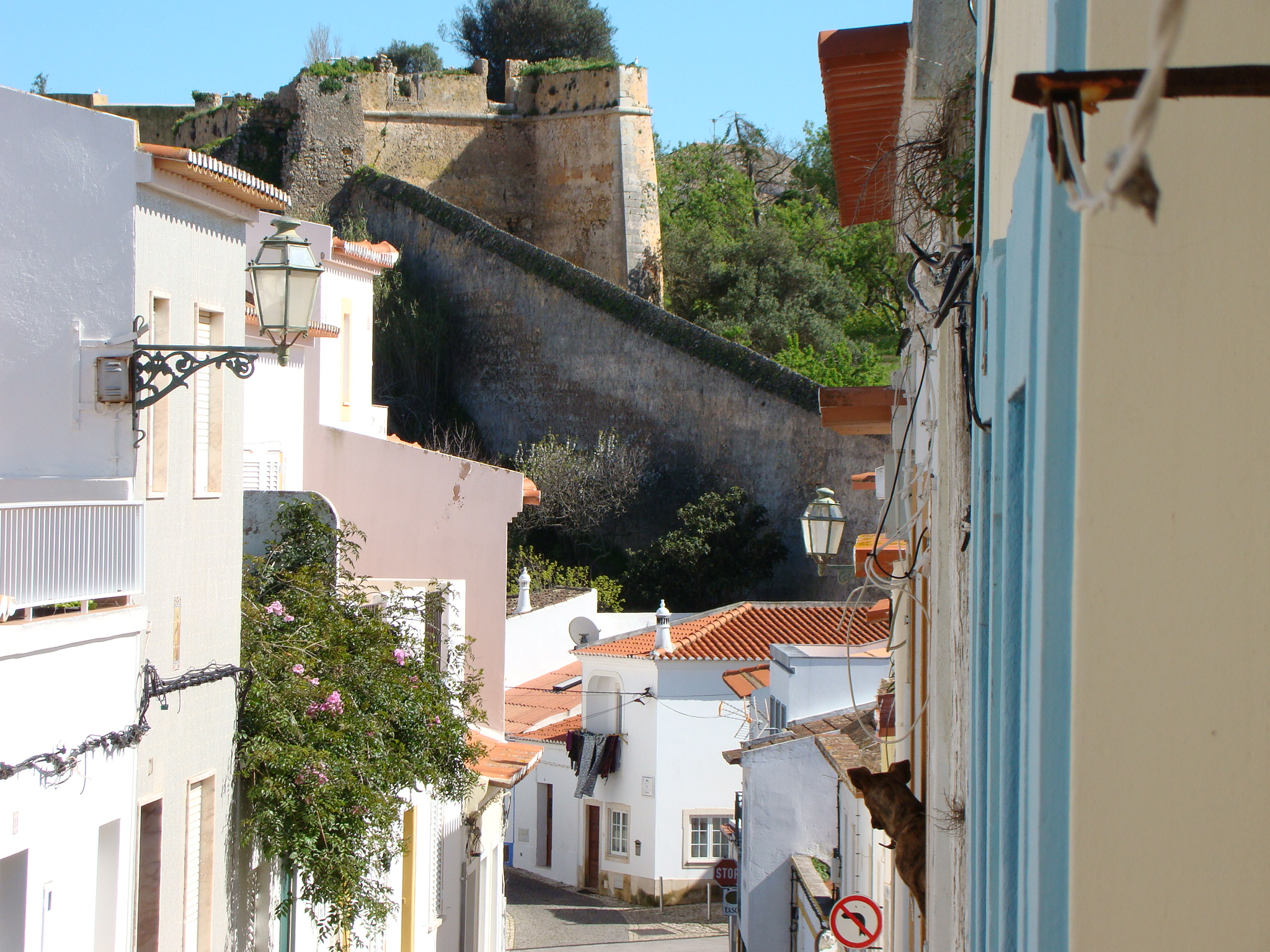 Centro histórico de Lagos - Algarve, Portugal